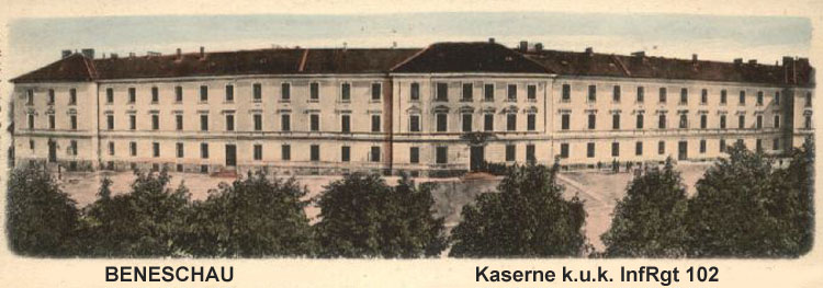 Kaserne des k.u.k. InfRgt 102 in Beneschau